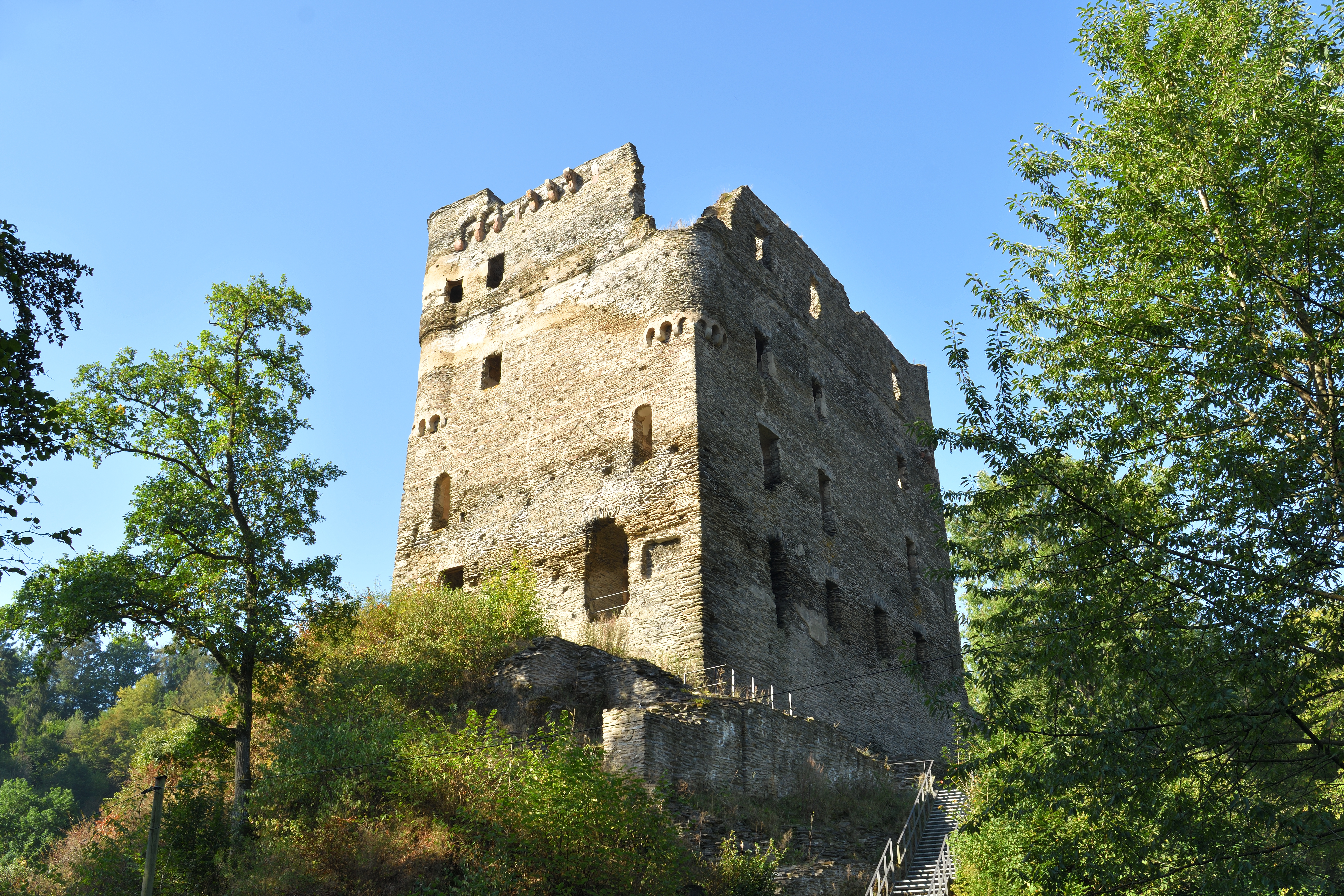 Das auf einem Felssporn befindliche Turmhaus der Burgruine Balduinseck von nordöstlicher Position betrachtet. Der moderne Zugang befindet sich an der Nordseite. Der historische Zugang erfolgte an der Ostseite mittels einer vorgelagerten Zugbrücke, die über den Halsgraben führte.